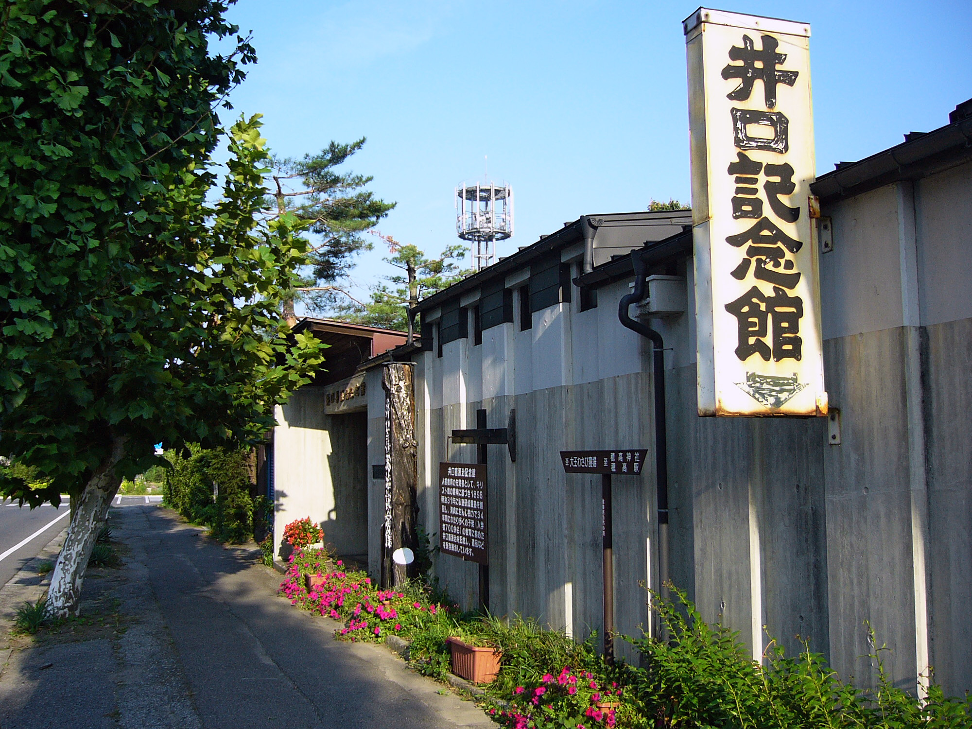 Iguchi Kigenji Memorial Hall in Azumino, Nagano, Japan